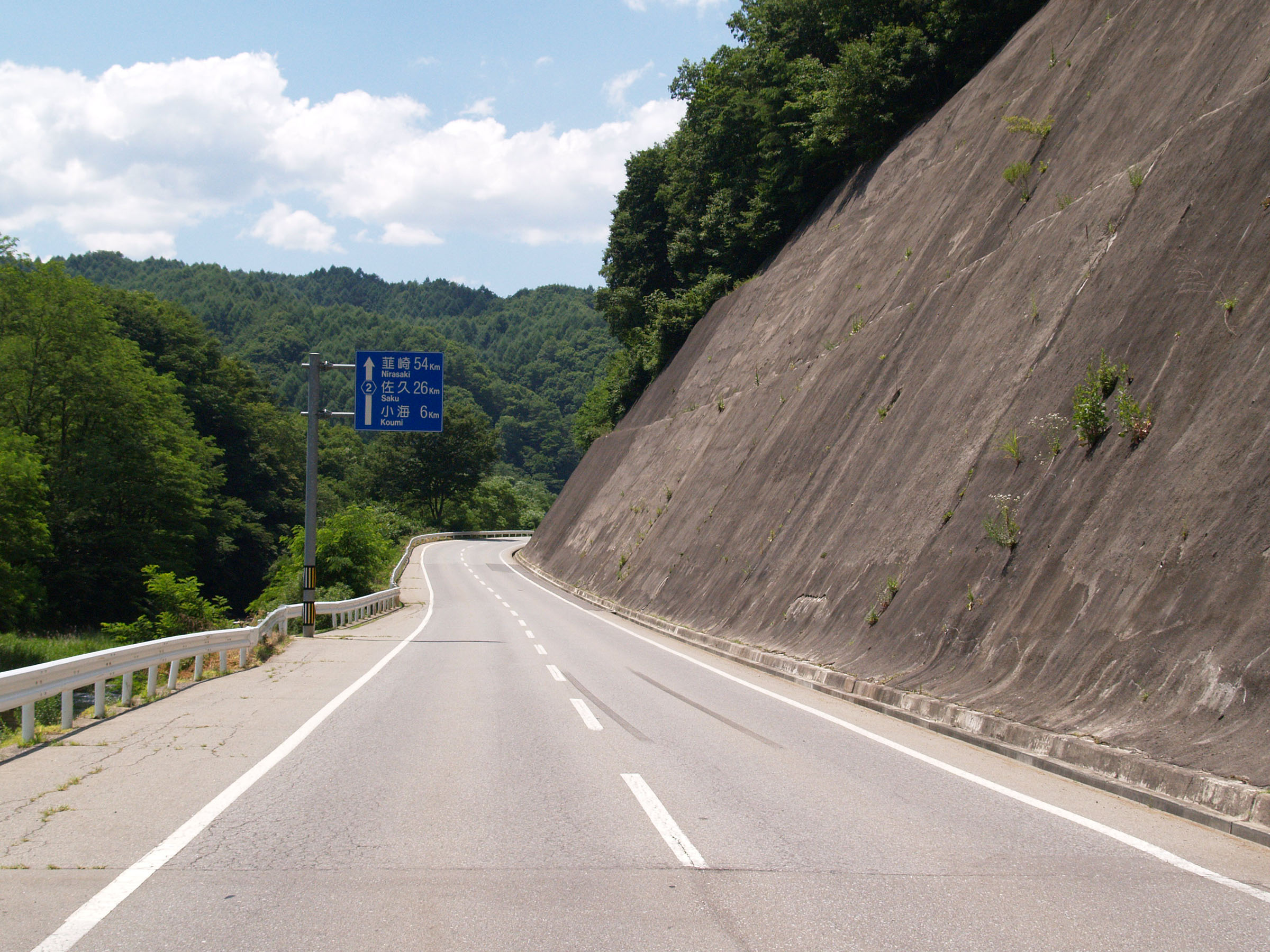 長野県道2号川上佐久線（北相木村にて）